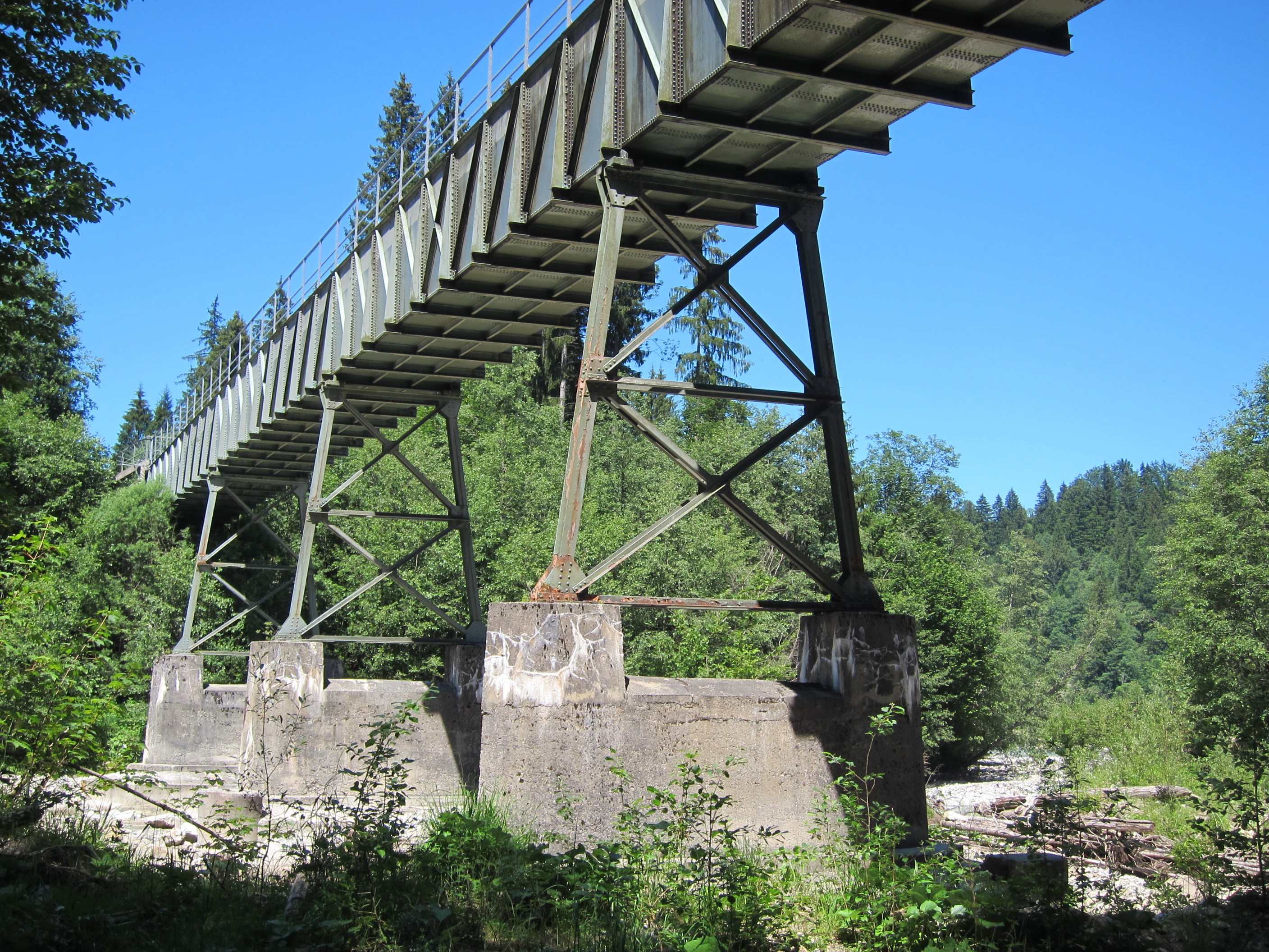 Wasserkraftwerk Kammerl, Aquädukt über die Halbammer